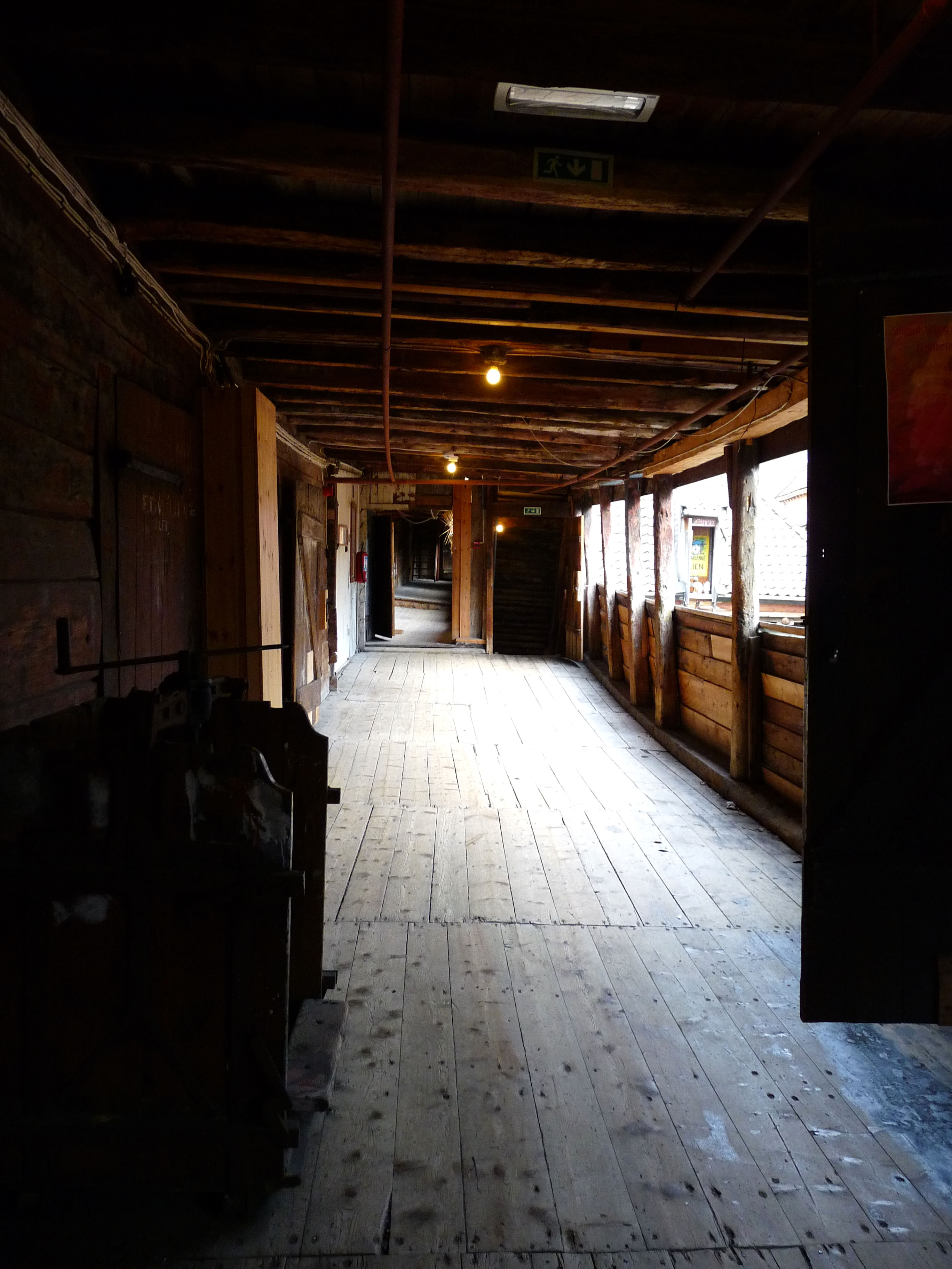 Bryggen 02